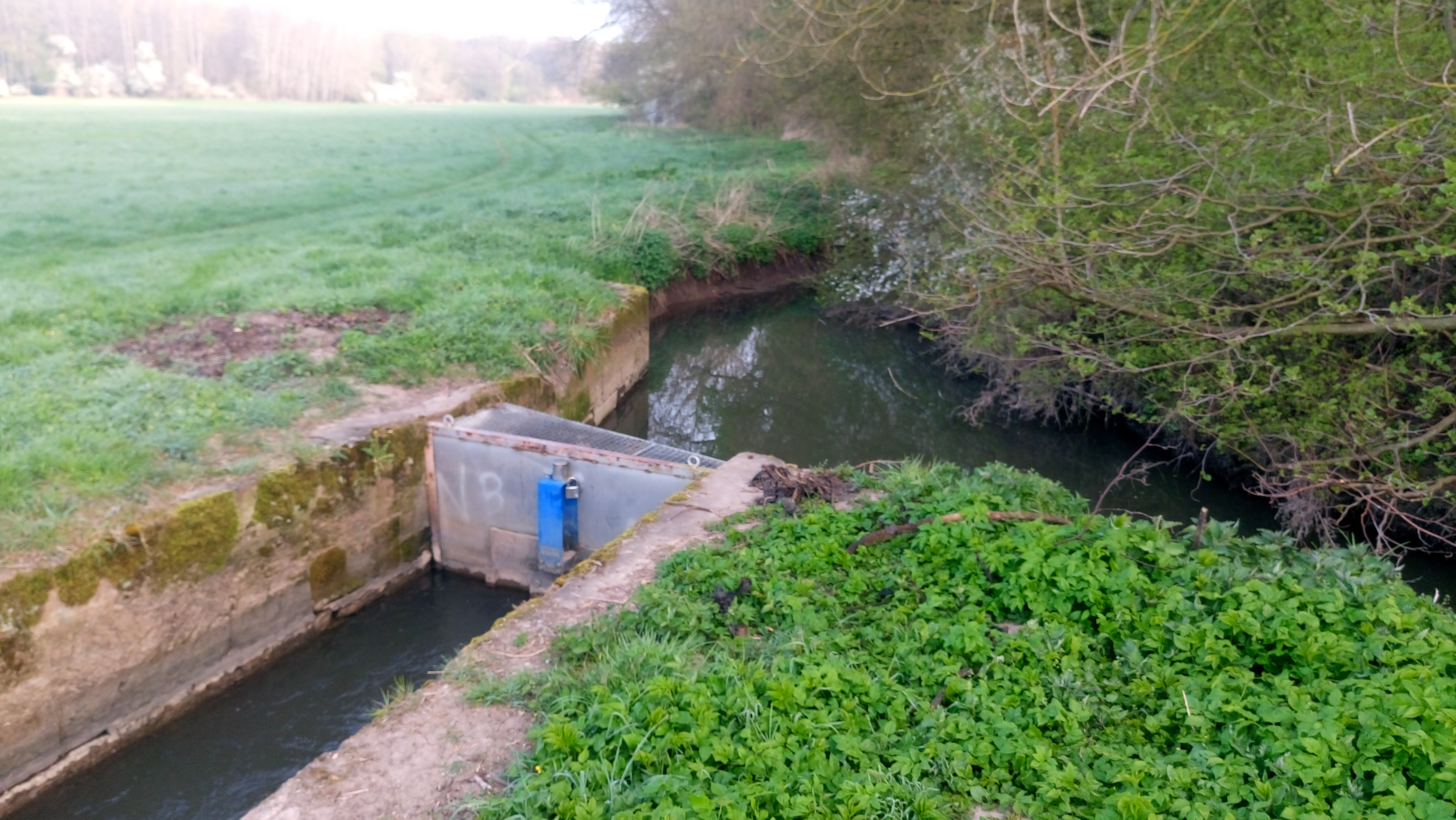 Die Teilung des Krebsbach und des Salisbaches